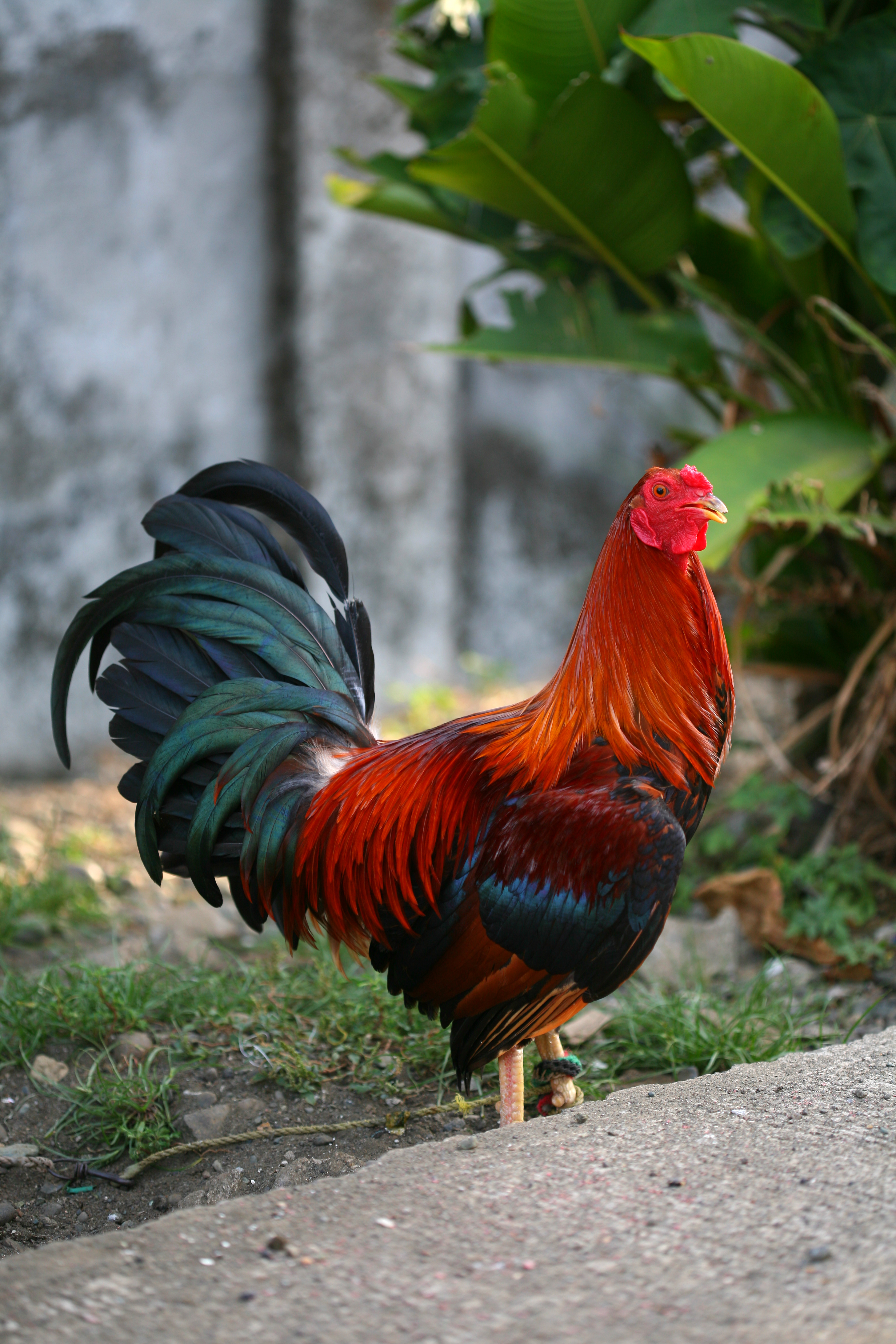 Gallo da combattimento fotografato a Mindanao, Filippine